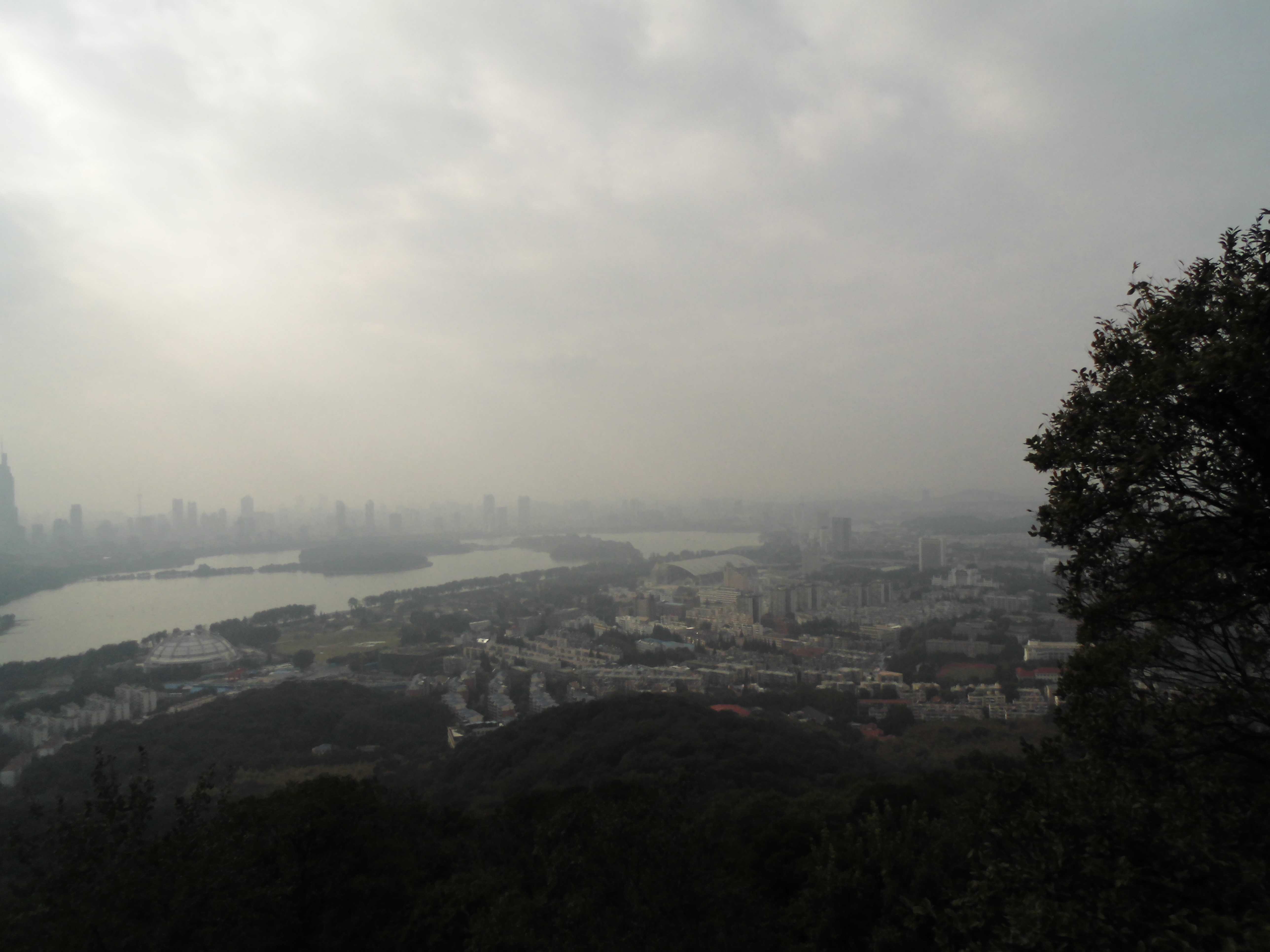 从紫金山上眺望南京。